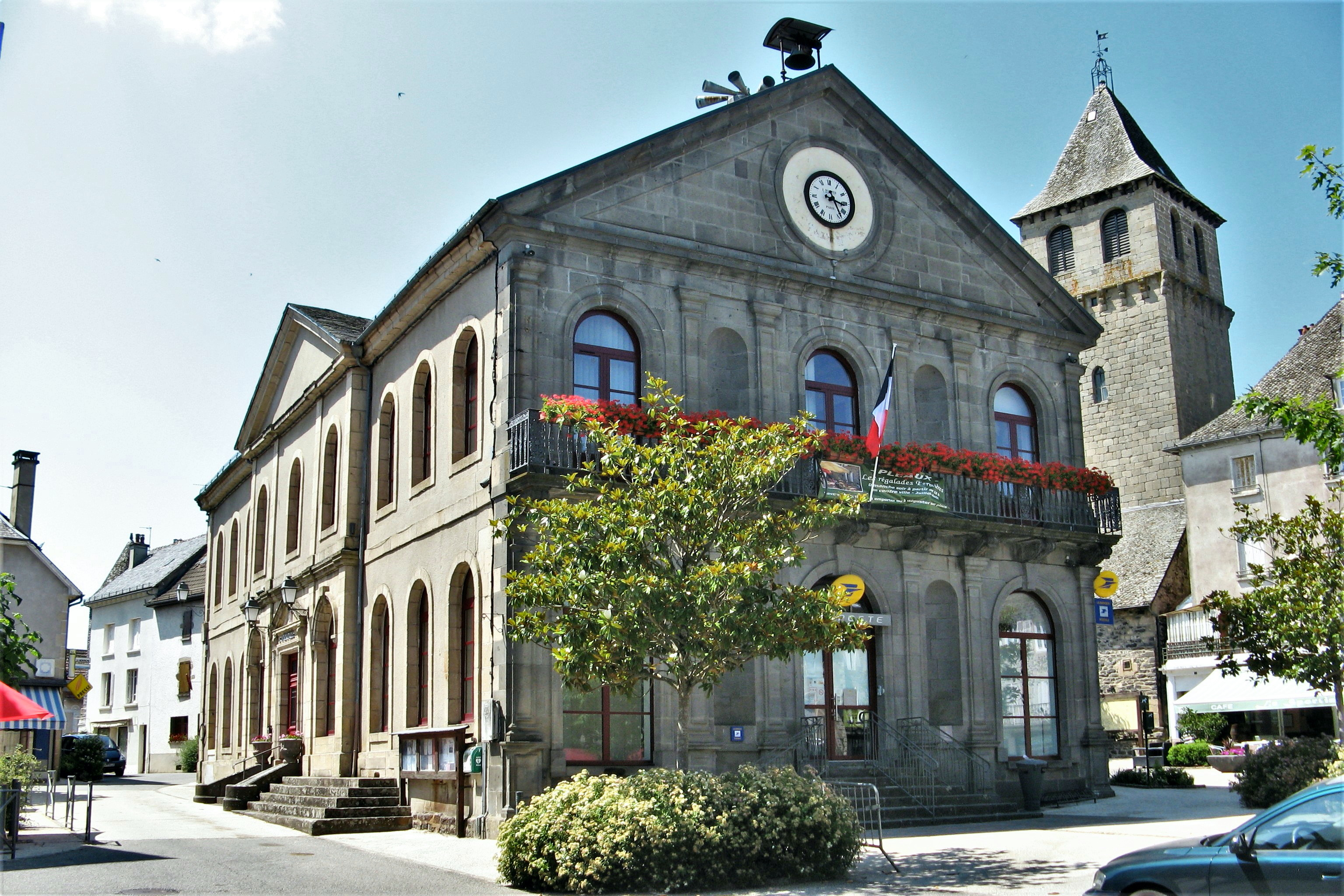 Pleaux, mairie (1845)